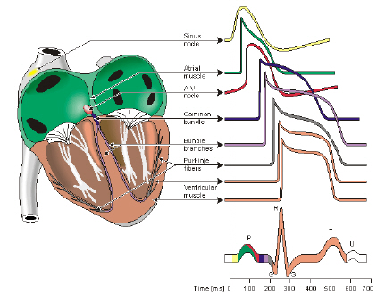 El registro de ECG en relación con los potenciales de acción de las diferentes estructuras cardíacas. NSA : nódulo sinusal, NAV : nódulo aurículo-ventriculo